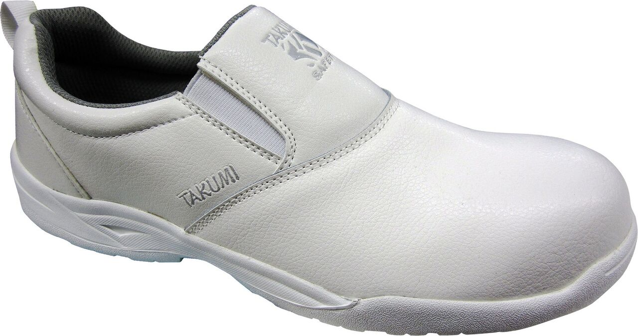 Giày Takumi chống tĩnh điện